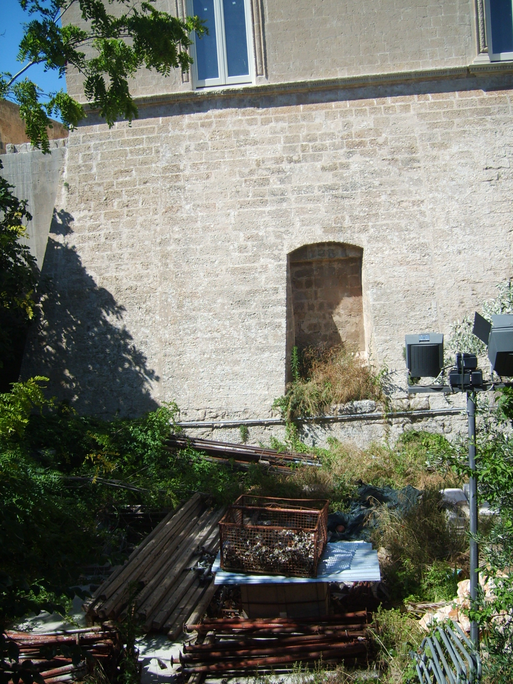 Scorcio del fossato del Castello Imperiali, a Francavilla Fontana.